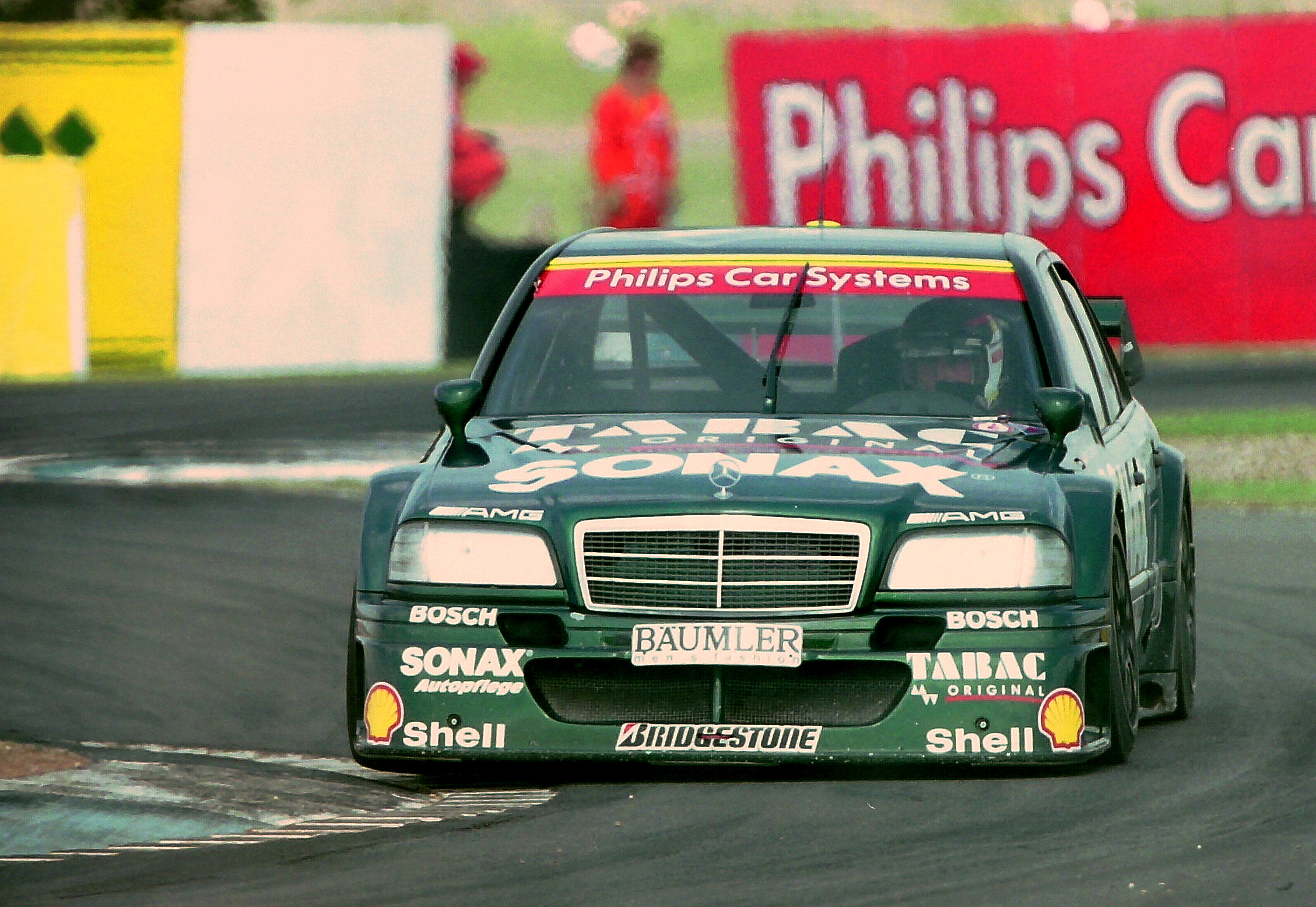 Bernd Schneider - AMG-Mercedes Tabac Original Sonax Team